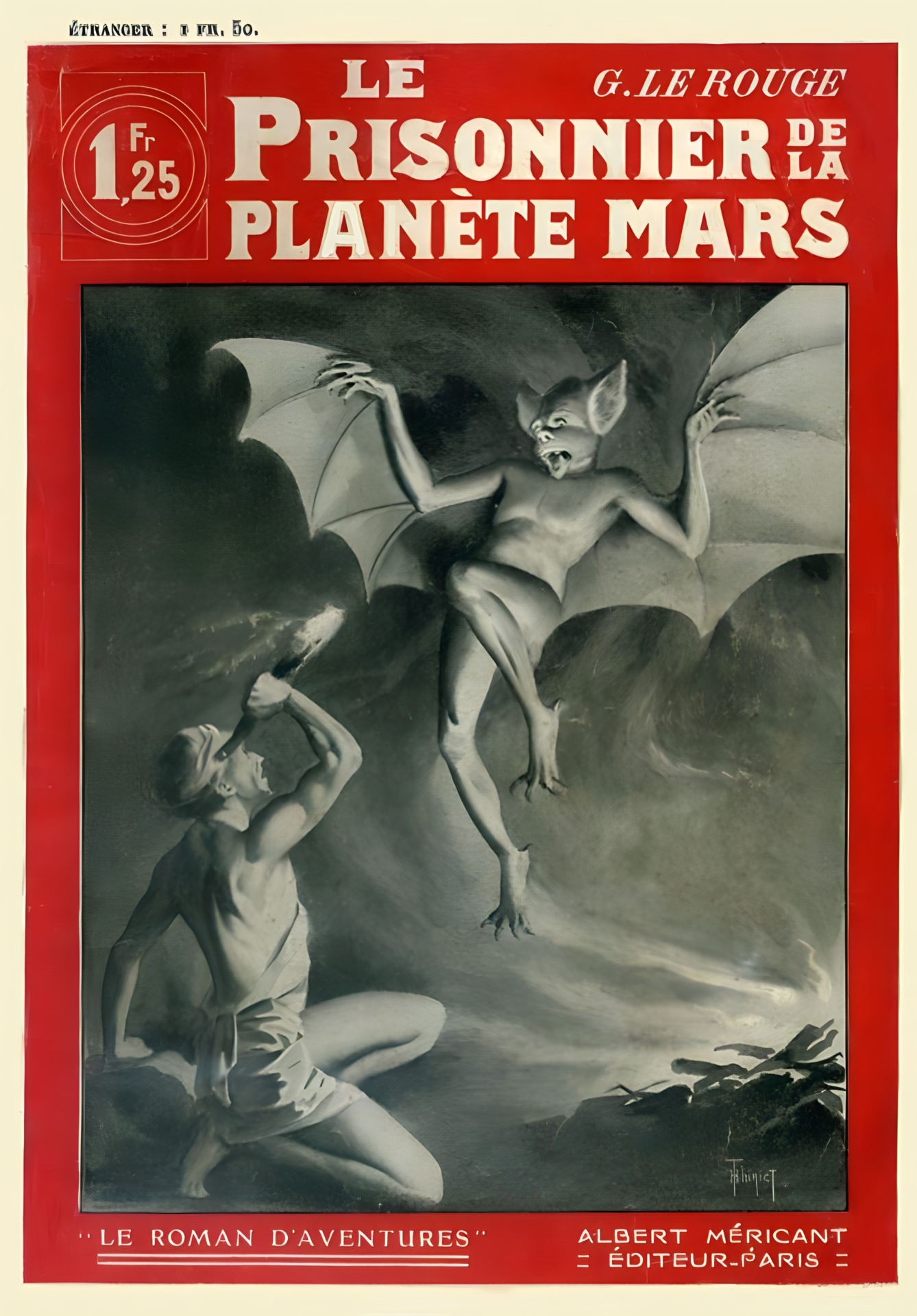 Couverture du roman de Gustave Le Rouge, Le Prisonnier de la planète Mars, Éditions Albert Méricant, collection « Le Roman d'Aventures », 1908, In-8 broché de 124 pages au format 17 x 24,3 cm. L'illustration de couverture est signée par Henri Thiriet, également auteur des illustrations noir et blanc en hors texte.